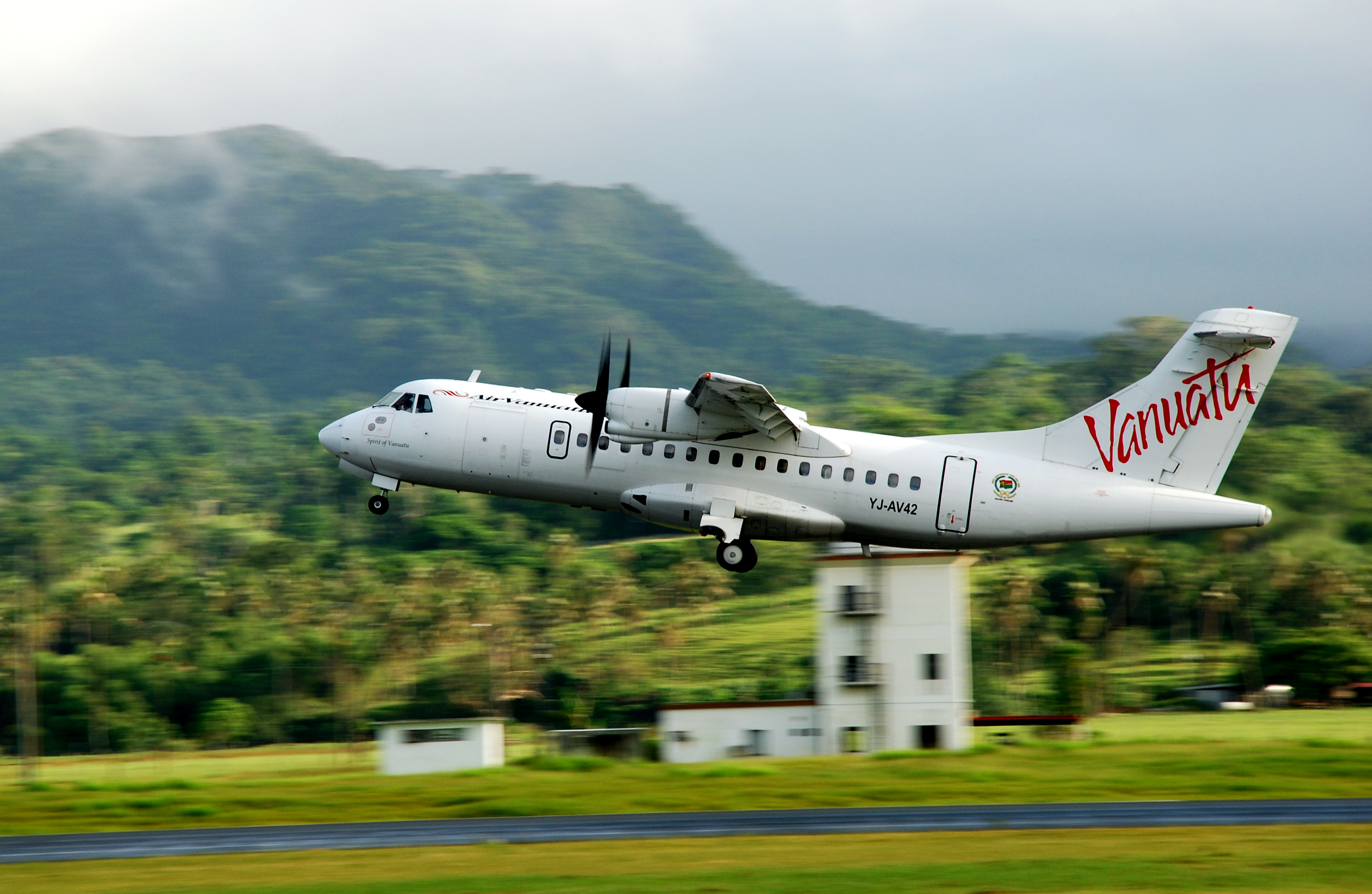 ATR 42 (YJ-AV42), Port Vila, Vanuatu